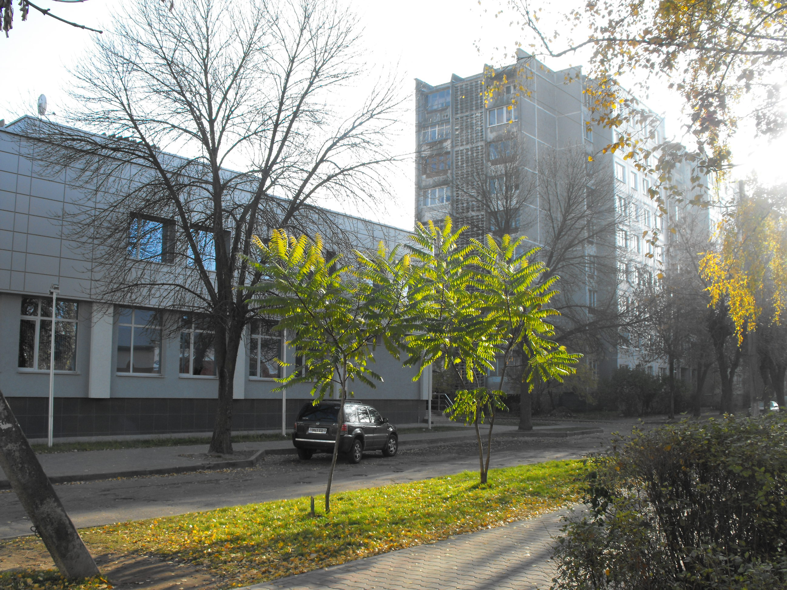 Ул. Куйбышева, г. Брест, Беларусь. Во время Второй мировой войны - ул. Длинная (на польском - ul. Dluga), центр Брестского гетто, место многих массовых расстрелов евреев нацистами.